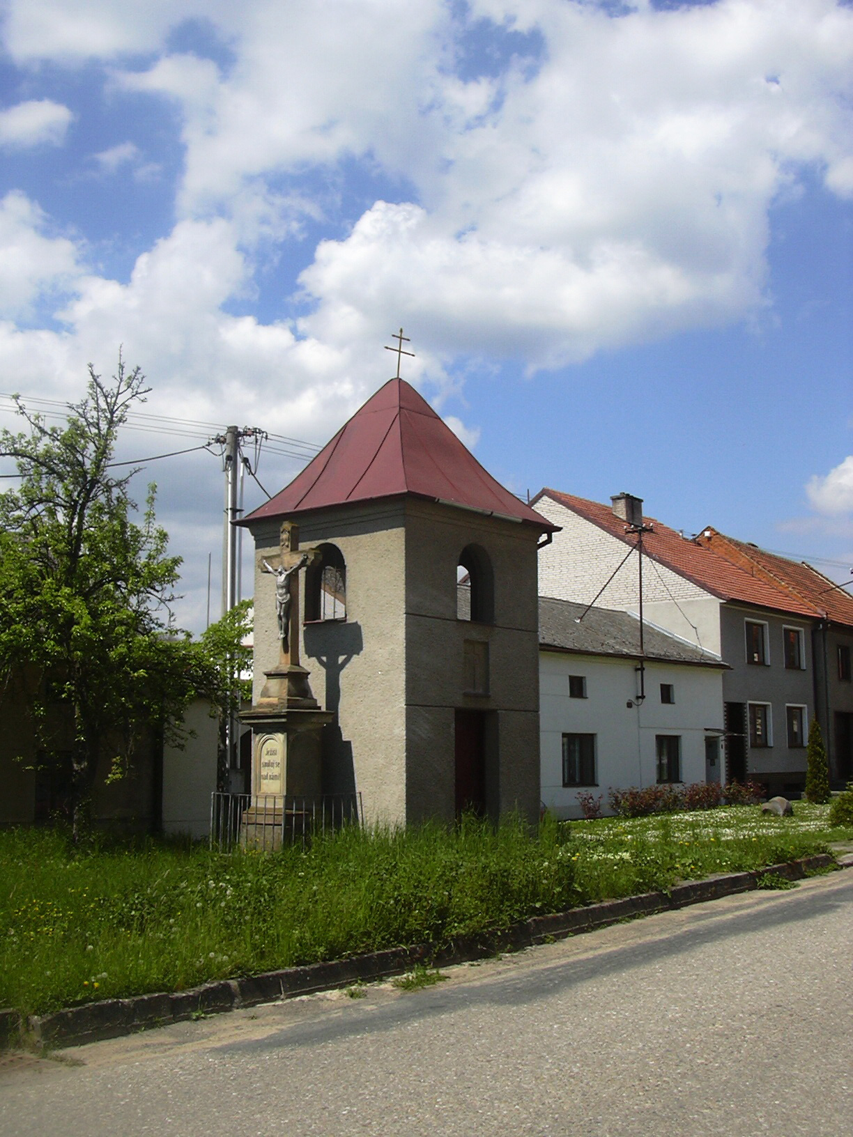 zvonička Radslavice (Vyškov District - Czech republic)